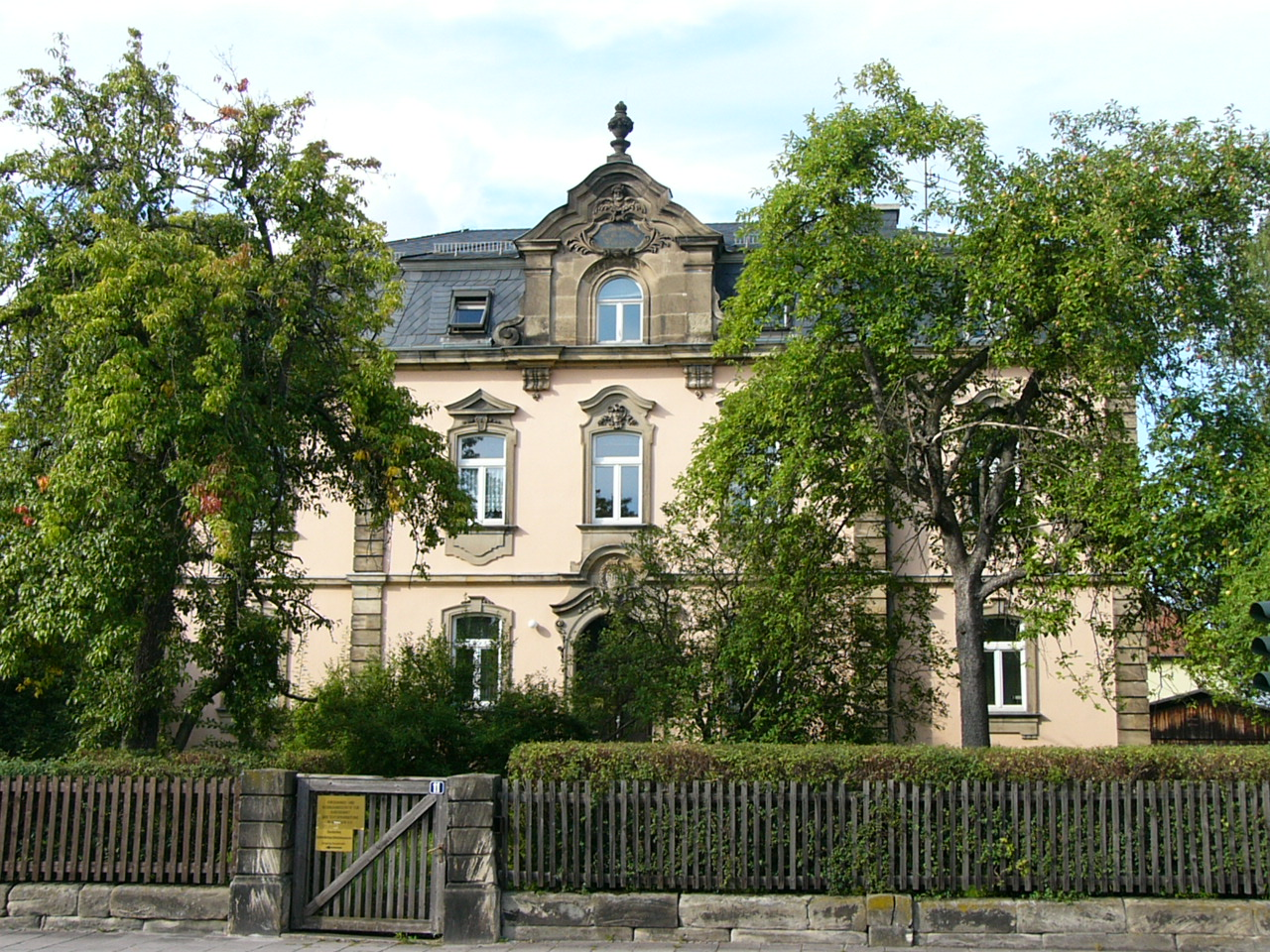 Leersches Waisenhaus in St. Georgen, heute u.a. Sitz des Deutschen Schreibmaschinenmuseums